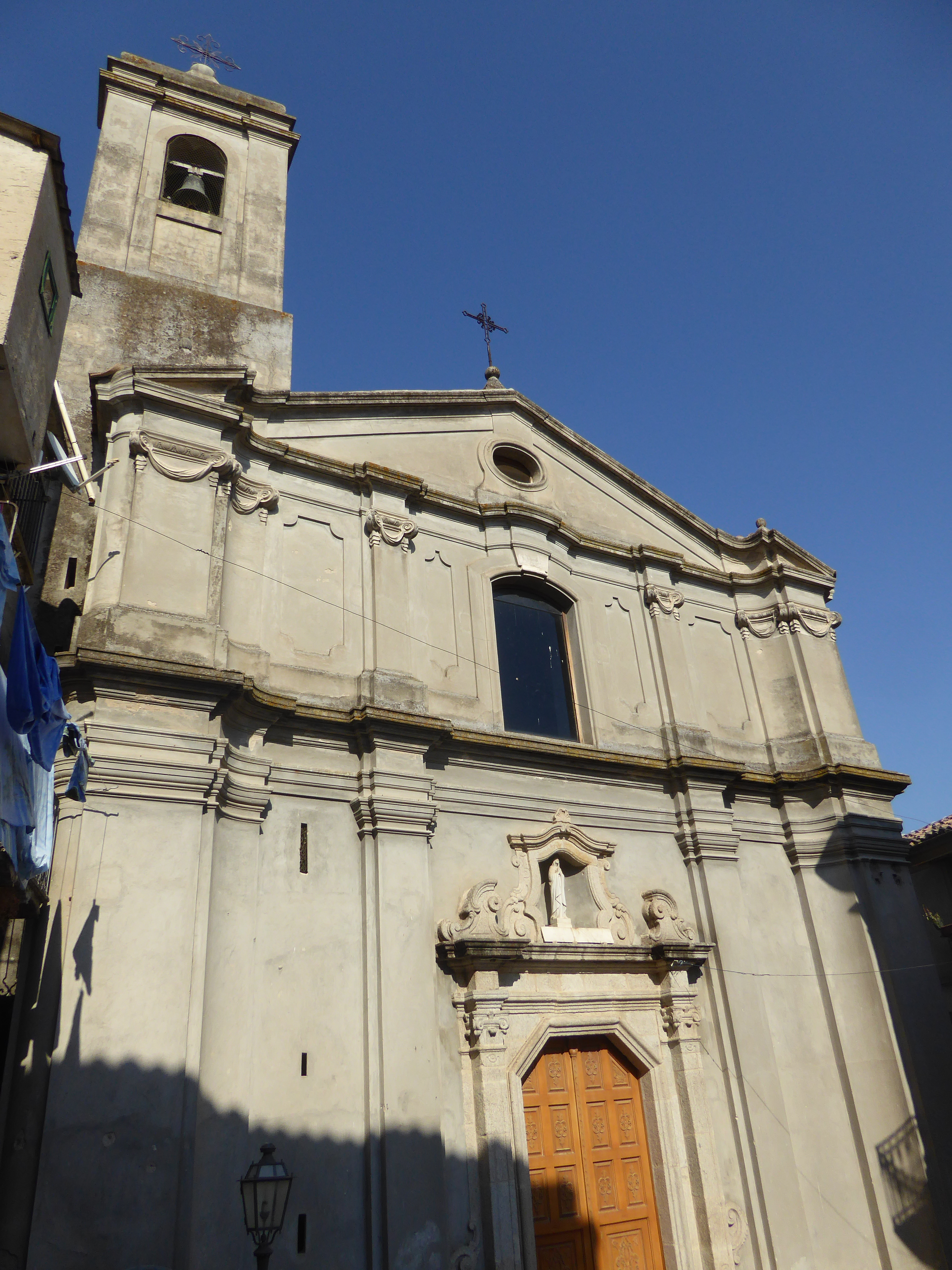 Chiesa di Sant'Agazio Martire a Guardavalle in Calabria (agosto 2019)